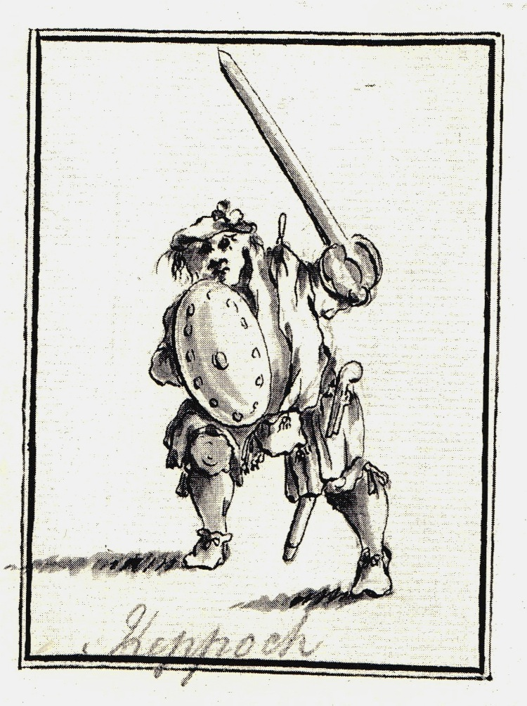 Набросок, сделанный неизвестным автором во время якобитского восстания 1745 года в Шотландии, в г. Пеникуик.